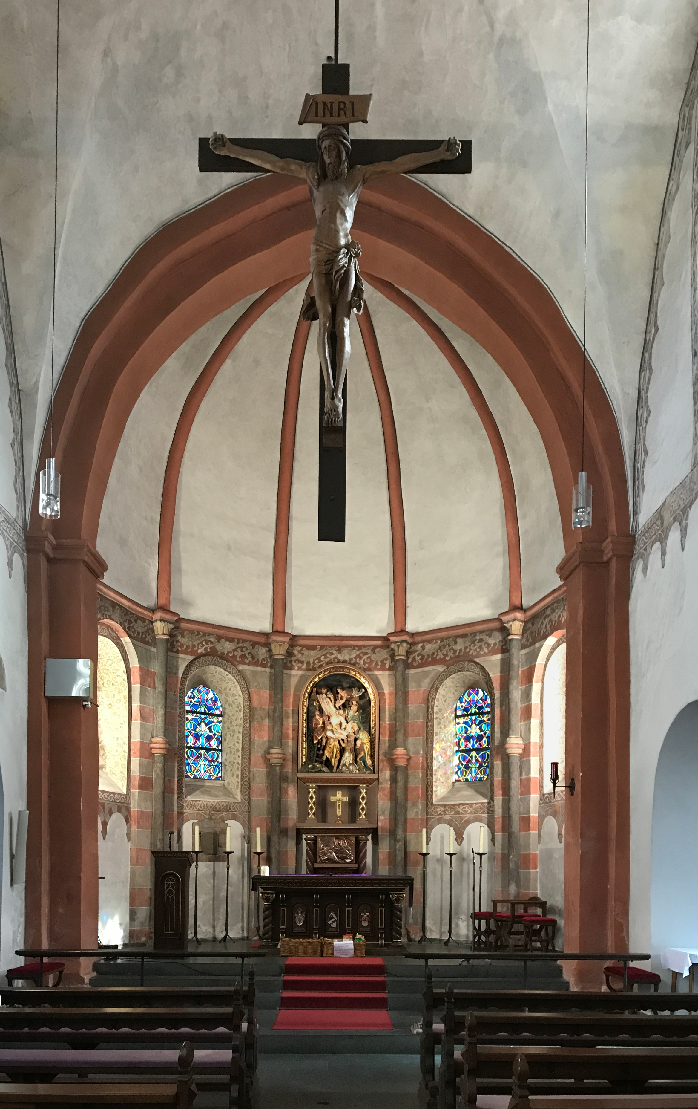 Kloster Niederehe in Üxheim